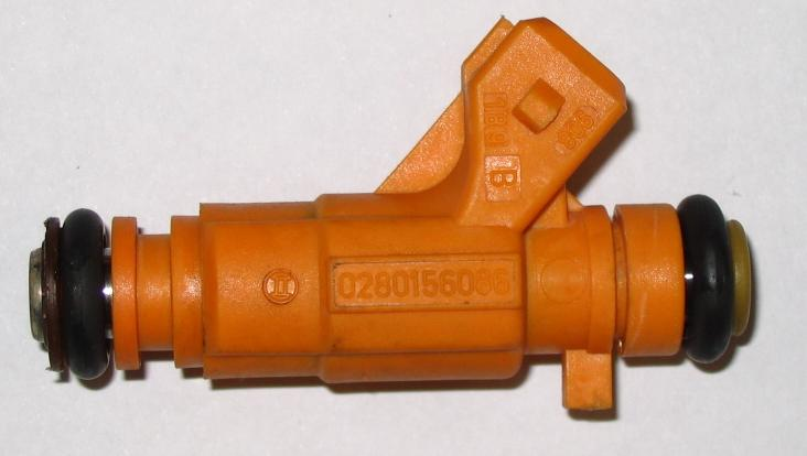 injetor combustível( fuel inject) do veiculo Astra Chevrolet de 1999